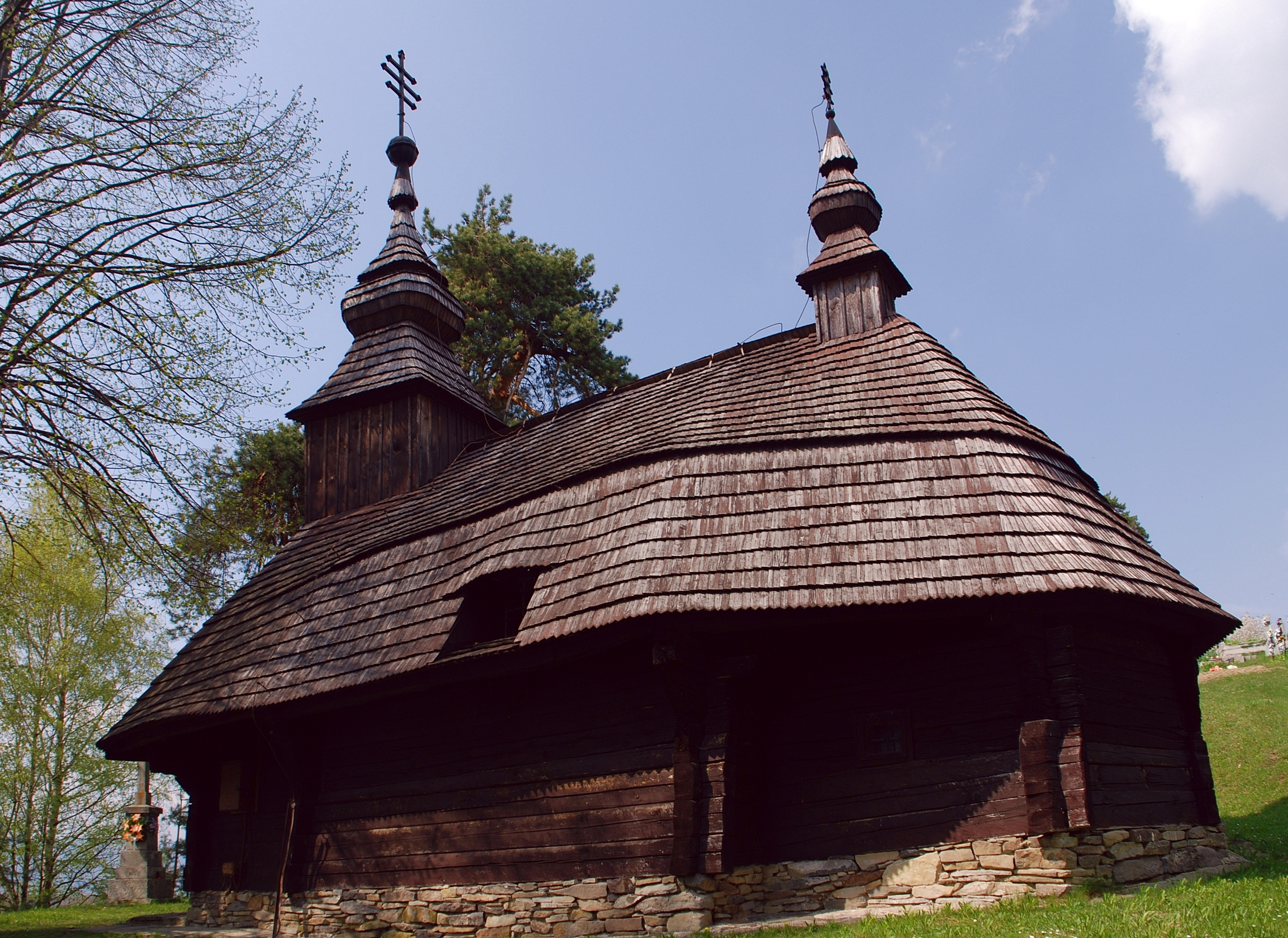 cerkiew